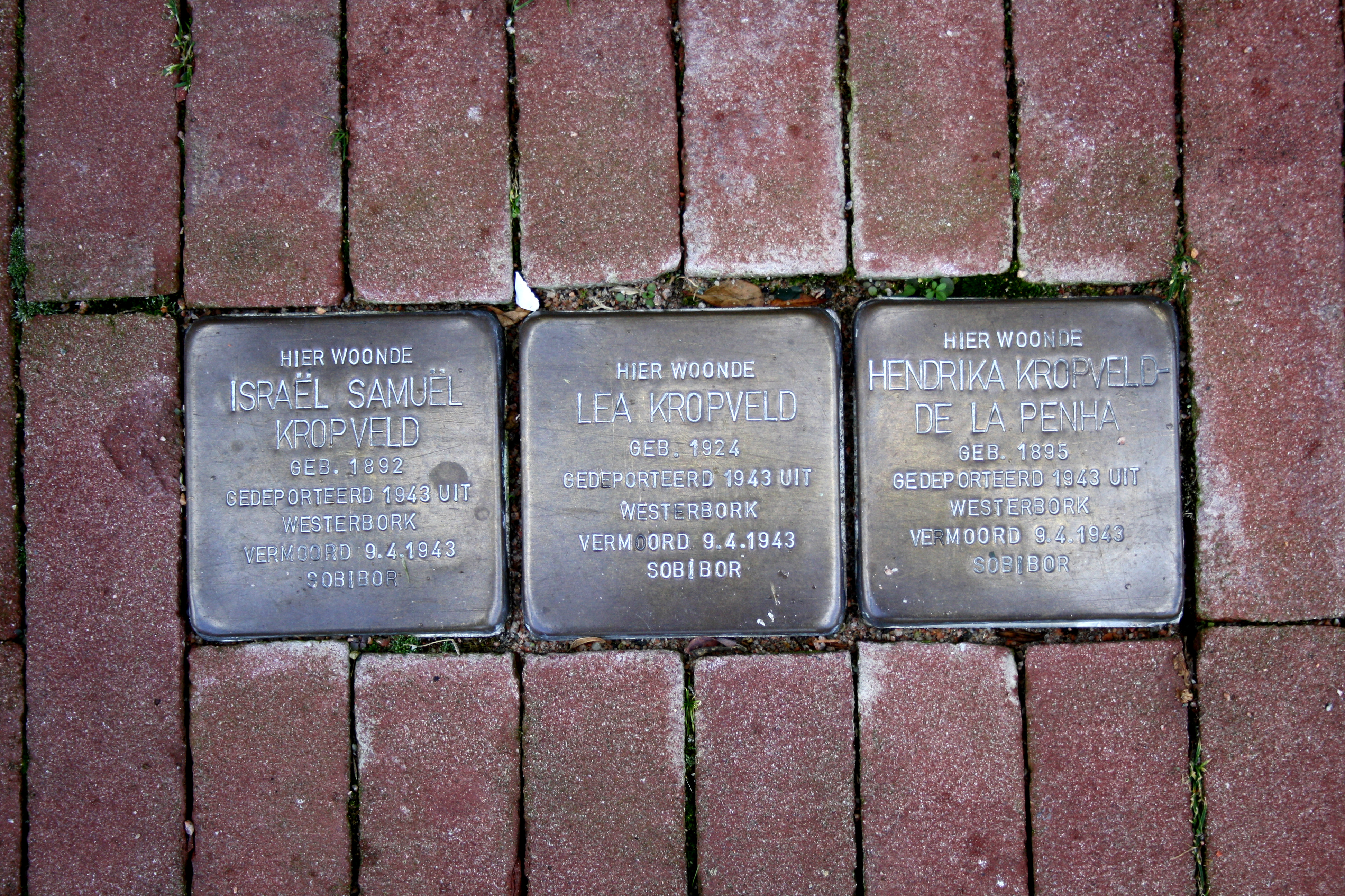 Urk - Stopersteine - Oranjestraat